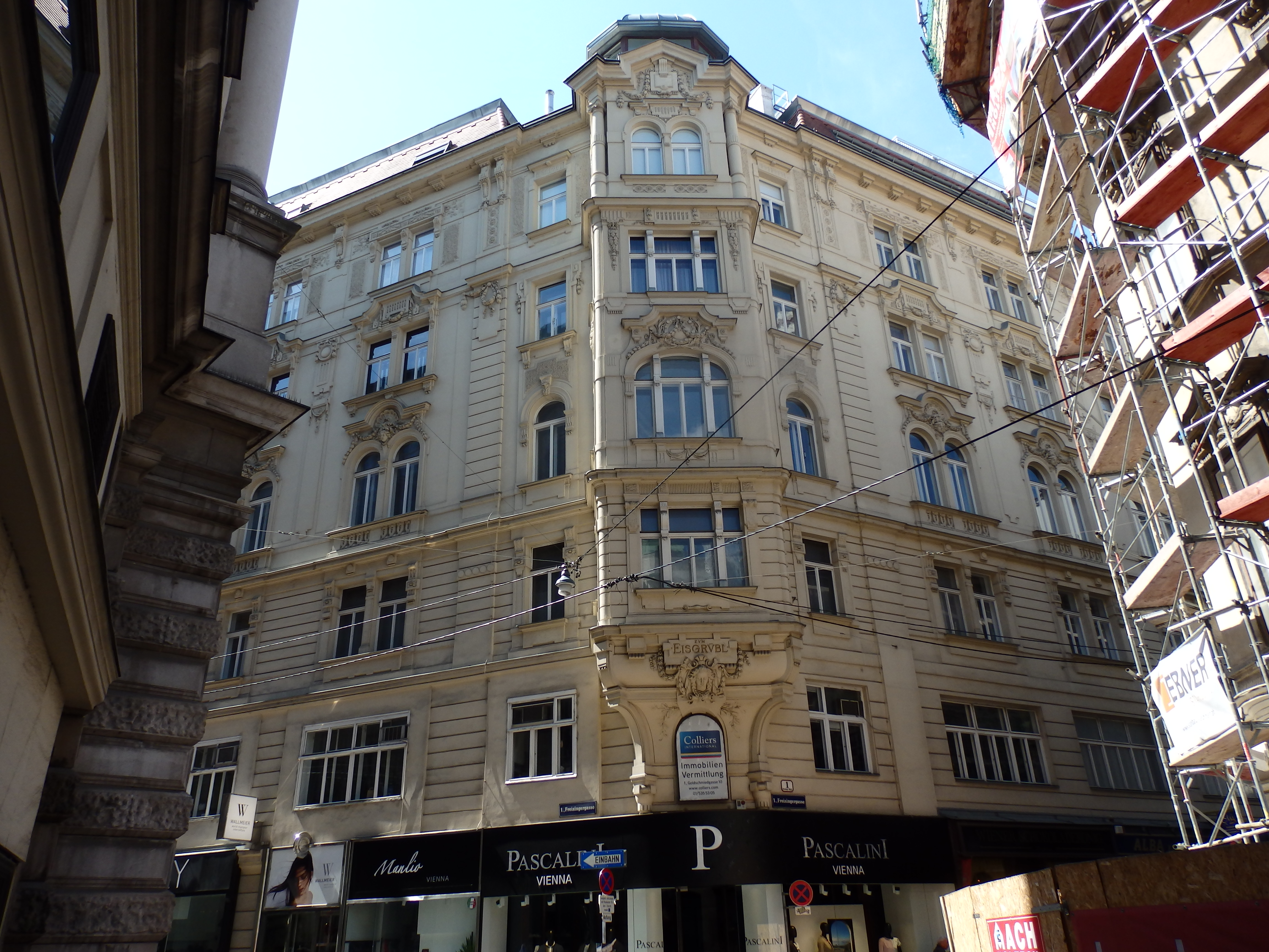 Zum Eisgrübl, Freingergasse 1, Wien-Innere Stadt